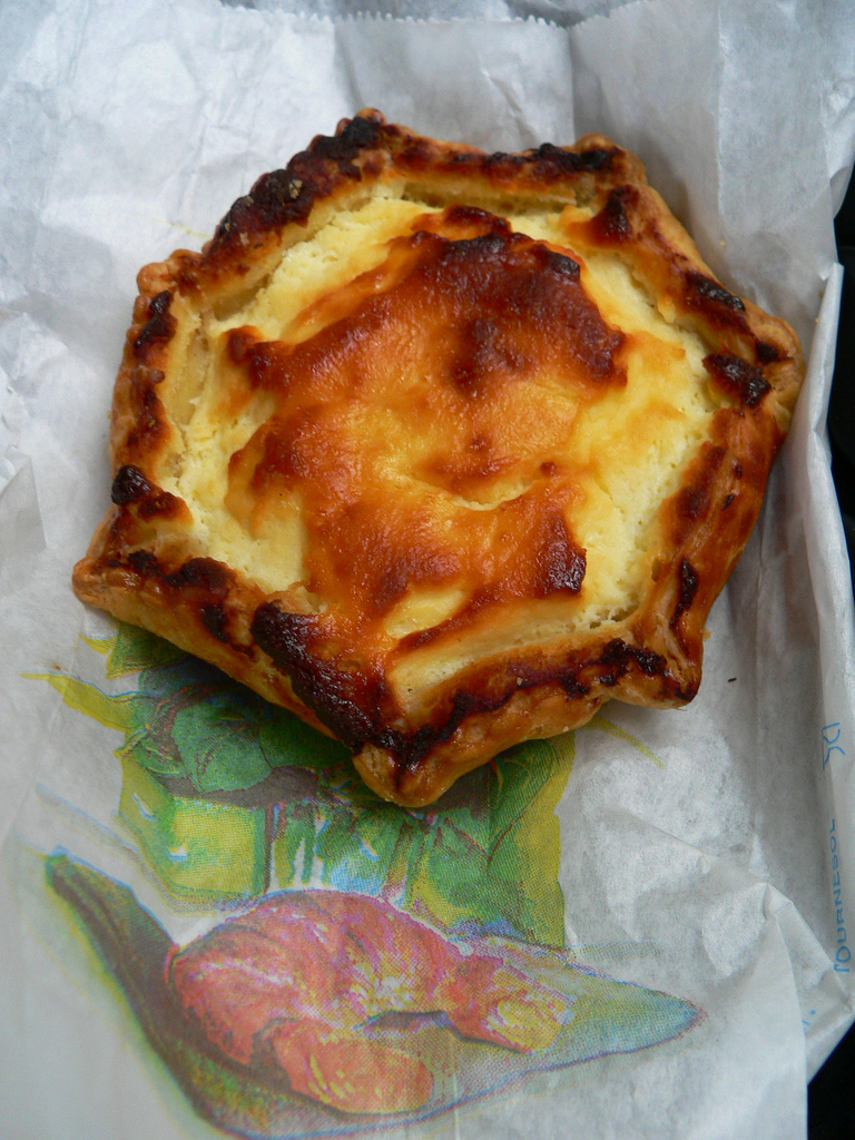 Pâtisserie corse à base de brocciu